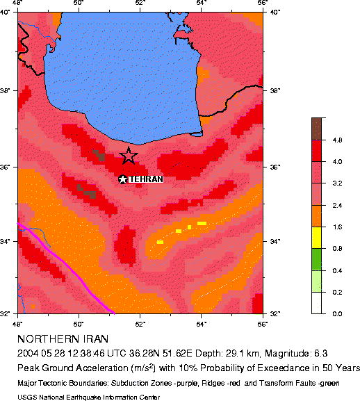 Tehran Seismic Hazard Map